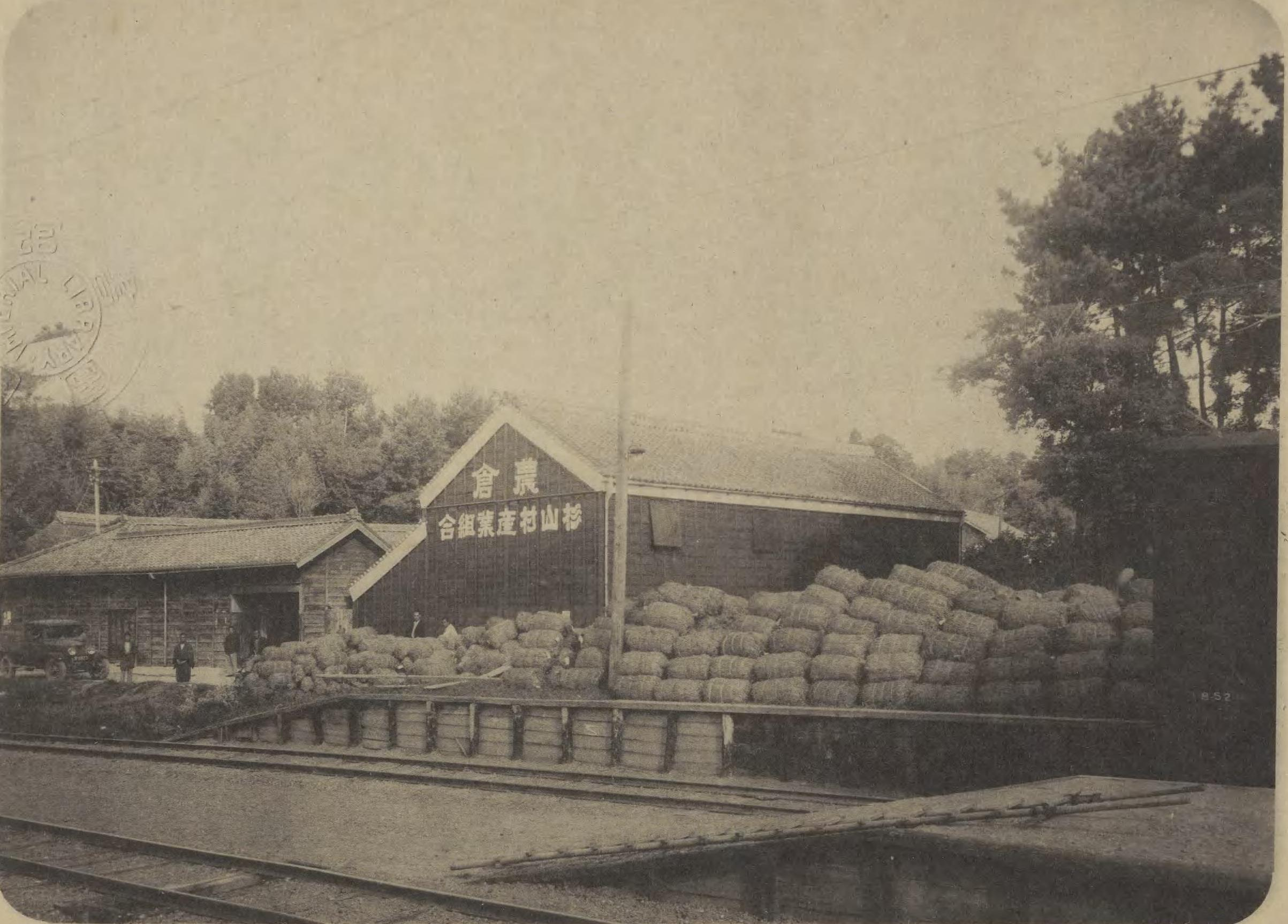 渥美電鉄線（現在の豊橋鉄道渥美線）杉山駅ホーム。中身はわからないが俵物の出荷待ちと思われる。